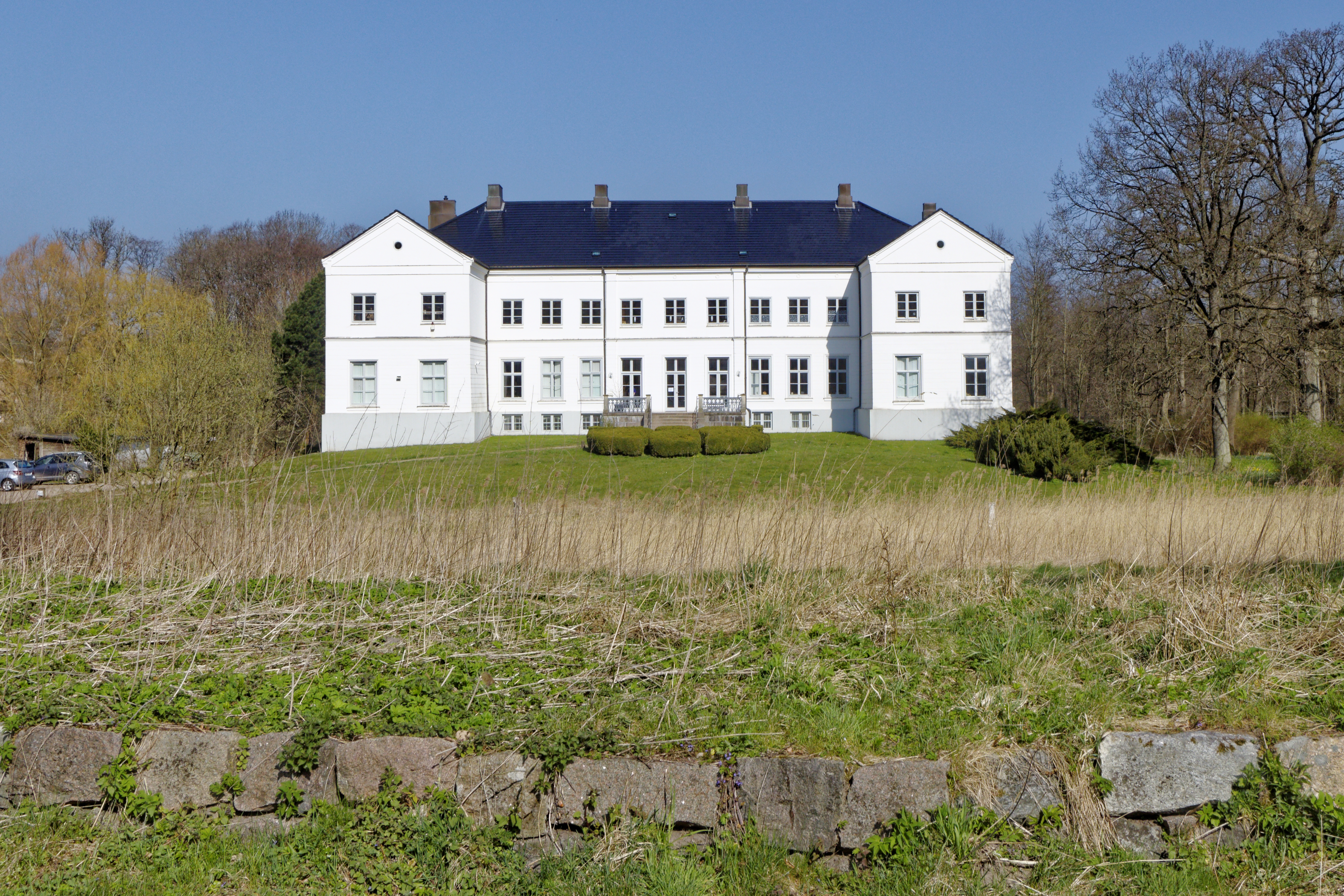 Windeby, Eichenallee 7; Herrenhaus